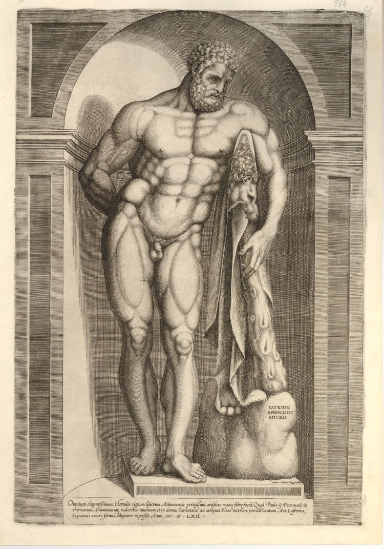 Hércules Farnesio, grabado a buril de Jacob Bos para el Speculum Romanae Magnificentiae de Antoine Lafrery. Inscripción: "Omnium elegantissimum Herculis signum Gliconis Atheniensis peritissimi artificis manu fabrefactum, quod Paulo III Pont. Max. in thermarum Antoniniarum ruderibus inventum, et in domus Farnesianae ad campum Florae interiori porticu locatum". En la piedra, en caracteres griegos: GLYCON ATHENAIOS EPOI. El grabado reproduce la escultura del Hércules Farnesio derivada de un modelo de Lisipo firmada por Glycon, escultor ateniense del siglo II a. C., que fue hallada en las termas de Caracalla en 1546. British Museum